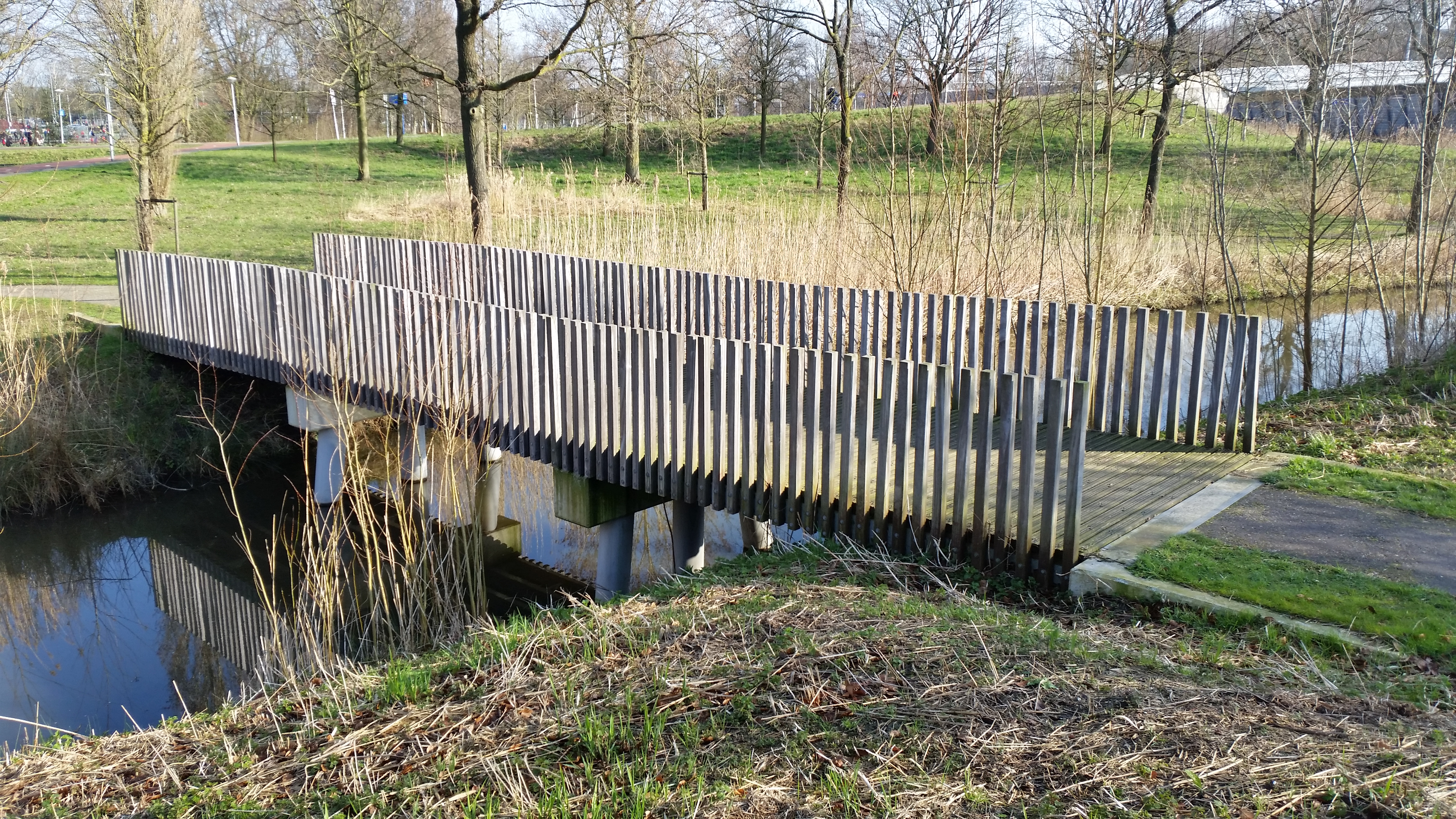 Impressie van de Nico Rijndersbrug voordat ze haar naam kreeg april 2020. Foto's uit maart 2020, Watergraafsmeer